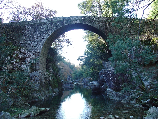 Ponte de Quintão - Uma ponte medieval situada em Carvalheira - Terras de Bouro